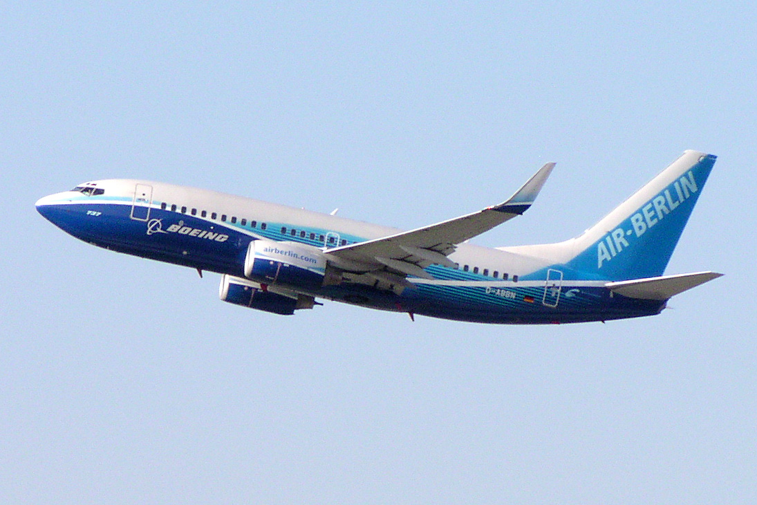 Air Berlin B737-700 D-ABBN in 787 Dreamliner colours in Düsseldorf (EDDL)